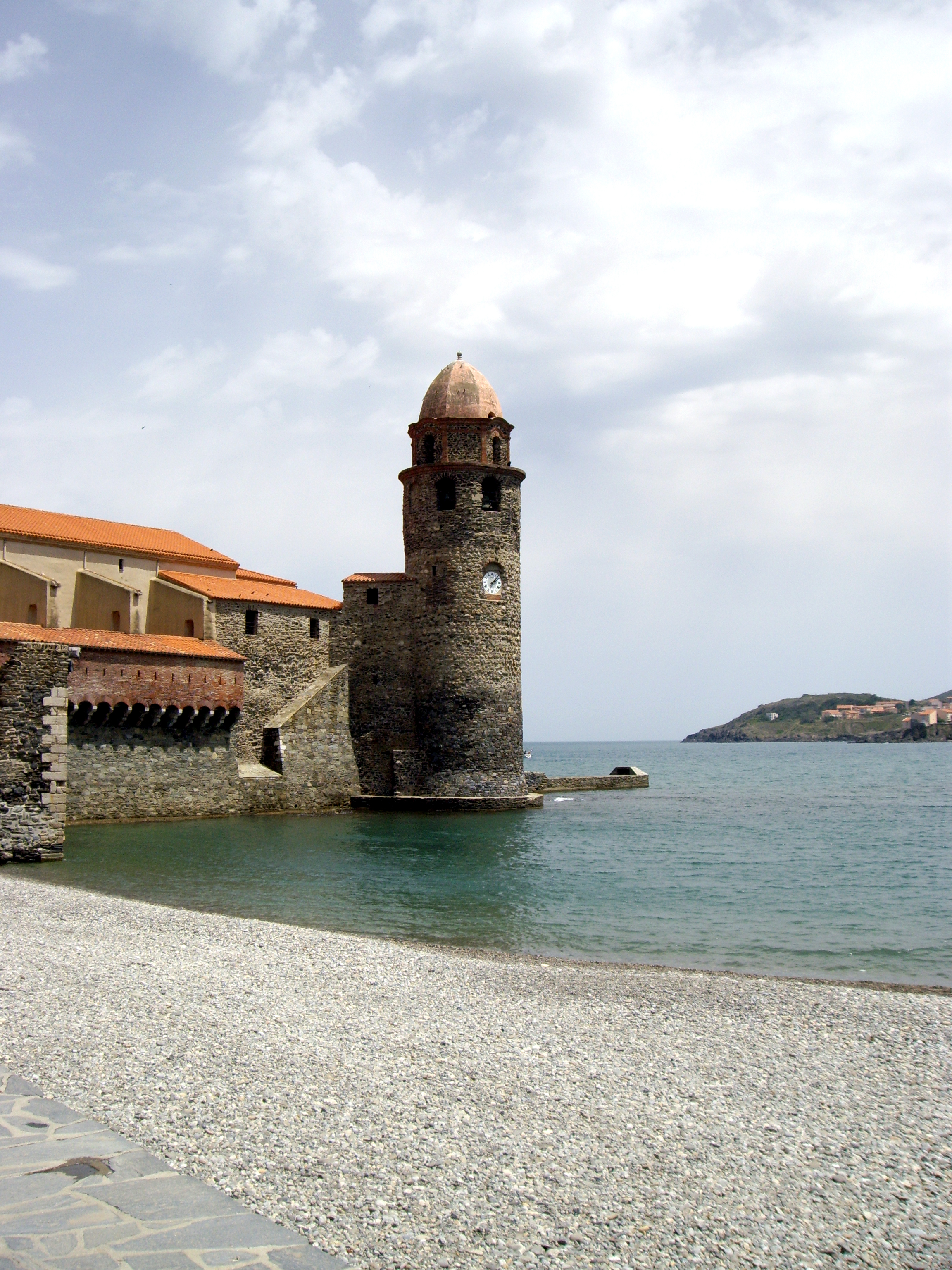 Clocher de l'église Notre-Dame-des-Anges de Collioure (66)